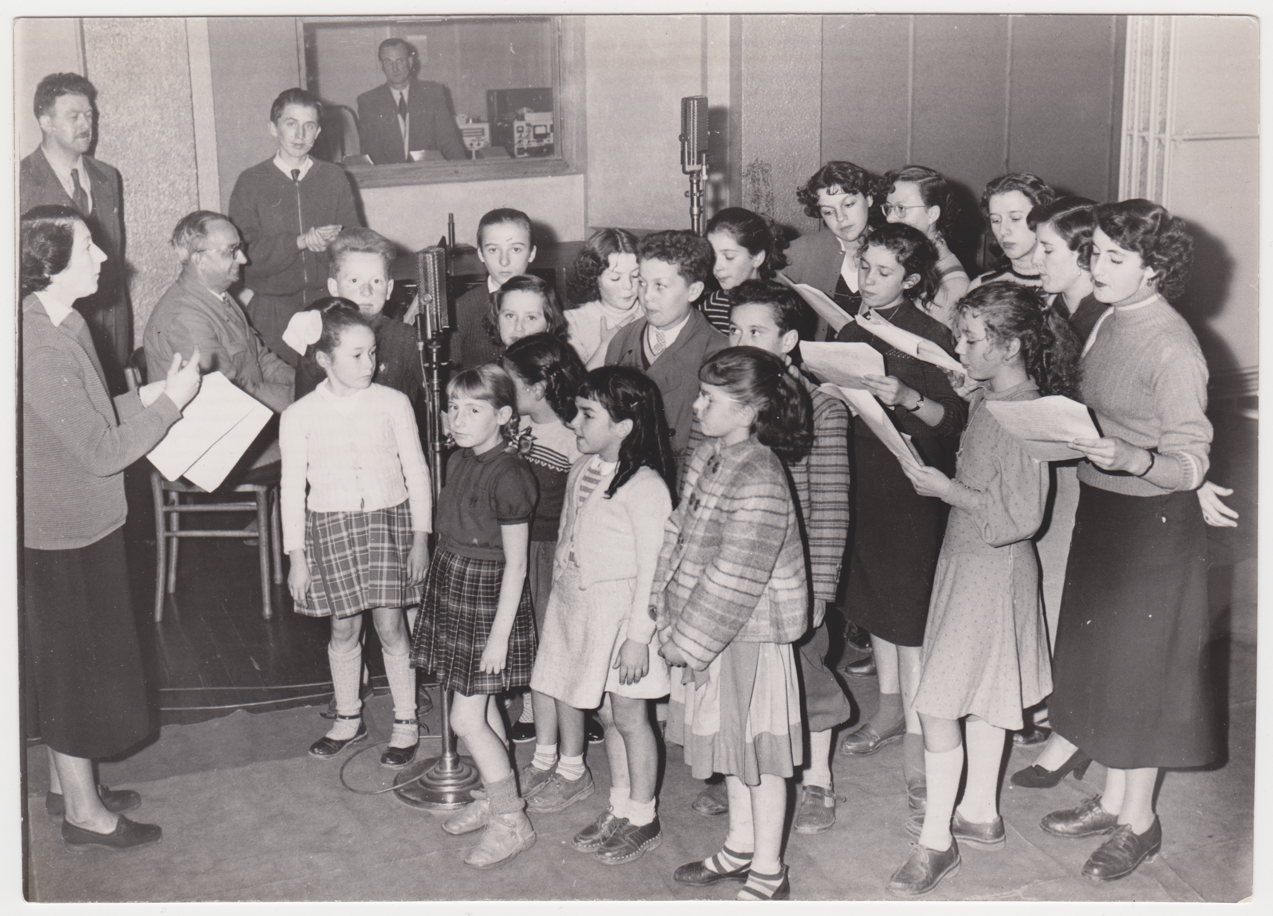 Dori CHAUVIN accompagne au piano la troupe des enfants animant l'émission radiophonique "Les Matinées enfantines de Cousine Odette" sur les ondes de Radio Bretagne.